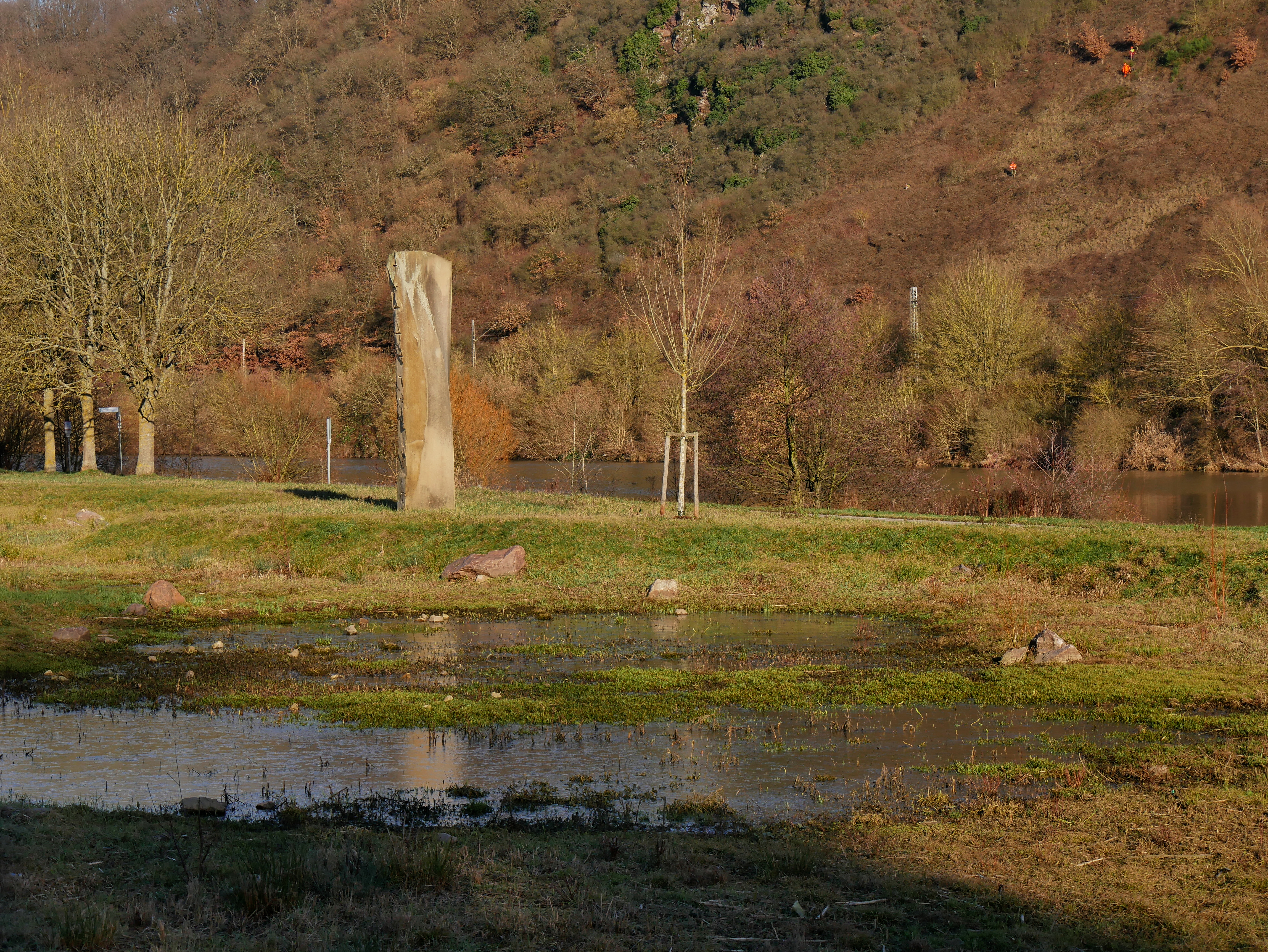 Tomas Michler, Sandstein hoher Dreher, Am Saarufer in Konz-Könen. Der Stein ist so bearbeitet, dass Statik und Gewicht scheinbar aufgehoben erscheinen. Entstanden im Rahmen des Bildhauersymposiums 2007 in Konz.